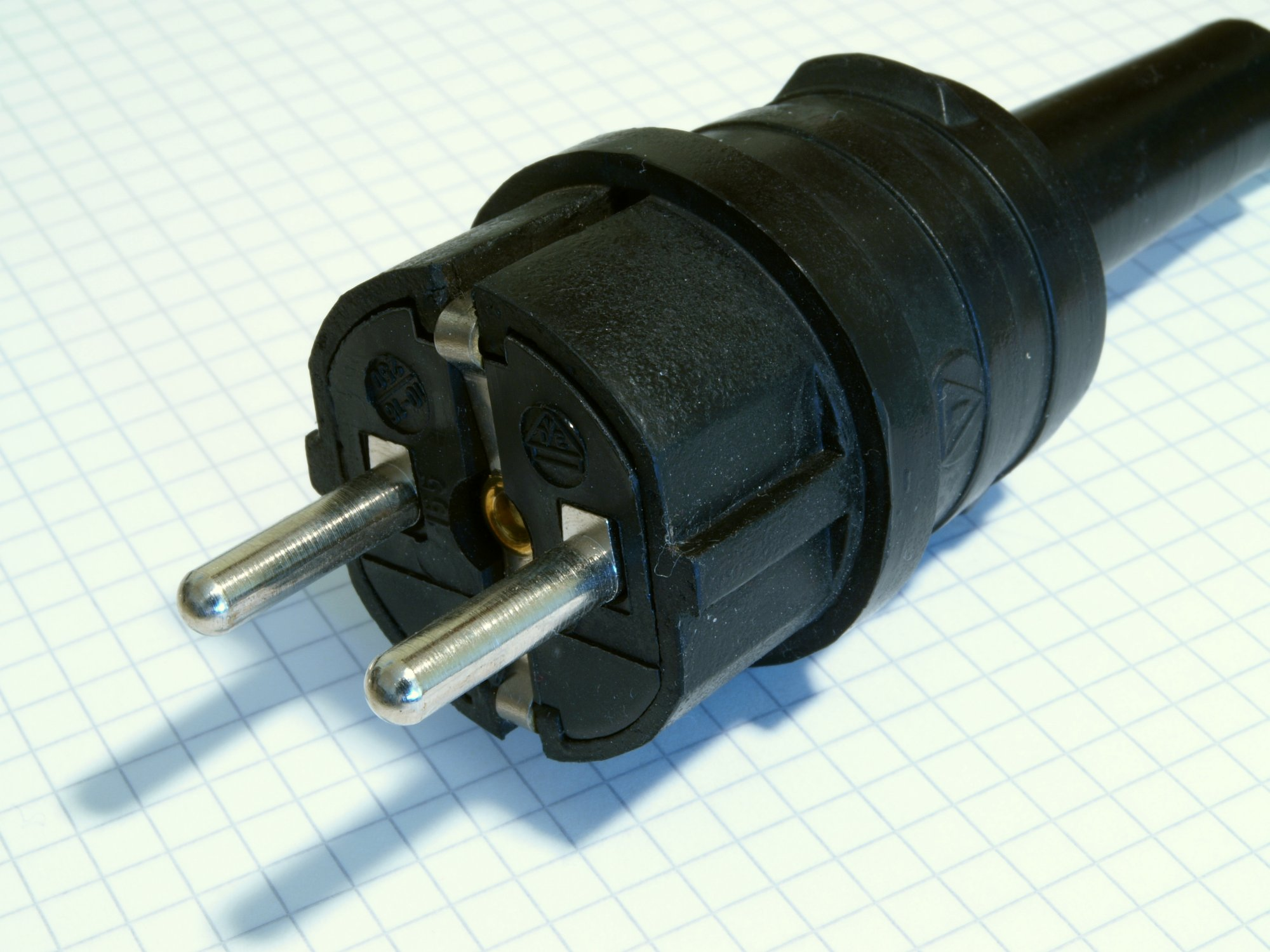 Standard-Schuko-Stecker nach Norm CEE 7/4